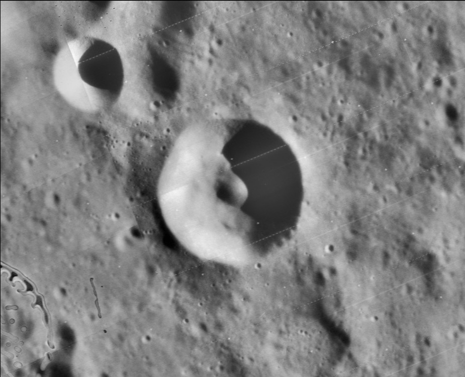 卫星坑"洛克伊尔 G"及中央峰